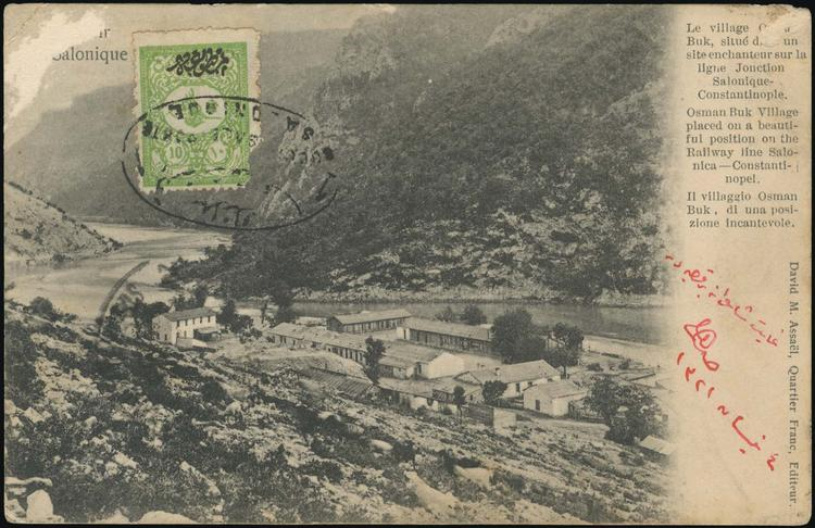 Гара Бук